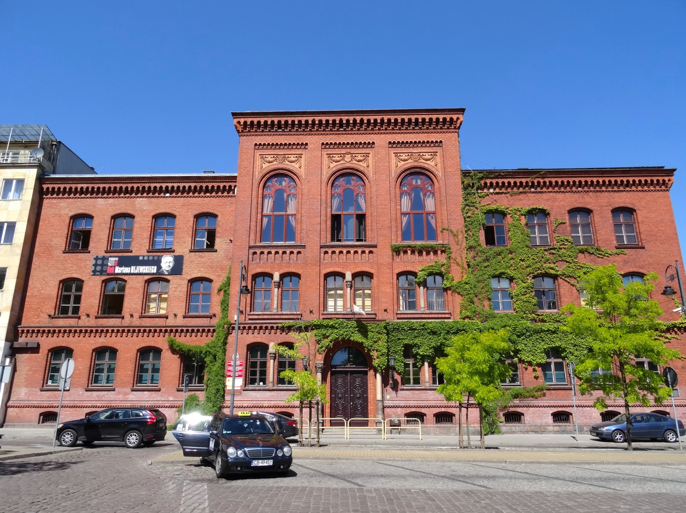 Budynek I L.O. w Bydgoszczy przy pl. Wolności, dawne Gimnazjum Królewskie (1876)